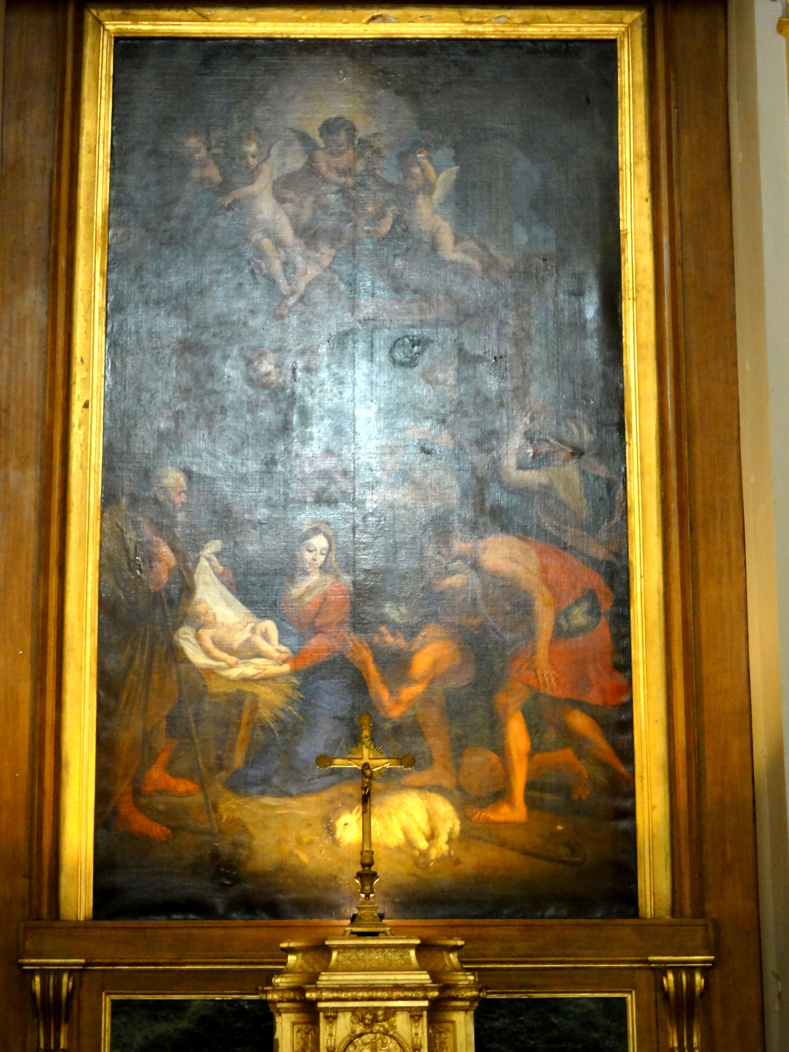 Tableau - L'Adoration des Bergers (retable du maître-autel).